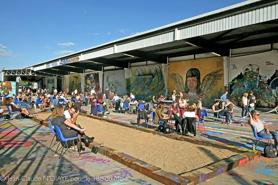 L'Aérosol